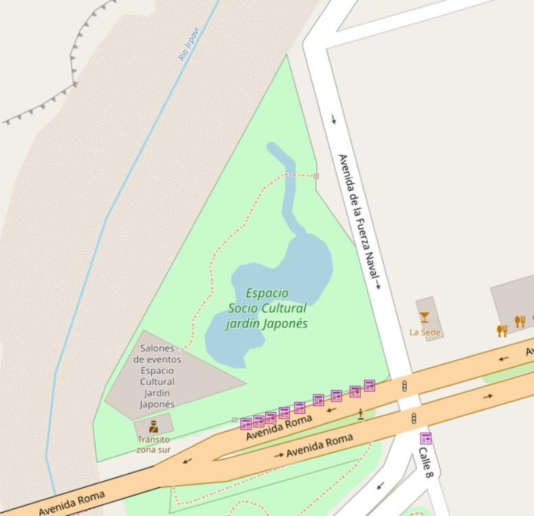 Mapa del Jardín japonés de La Paz